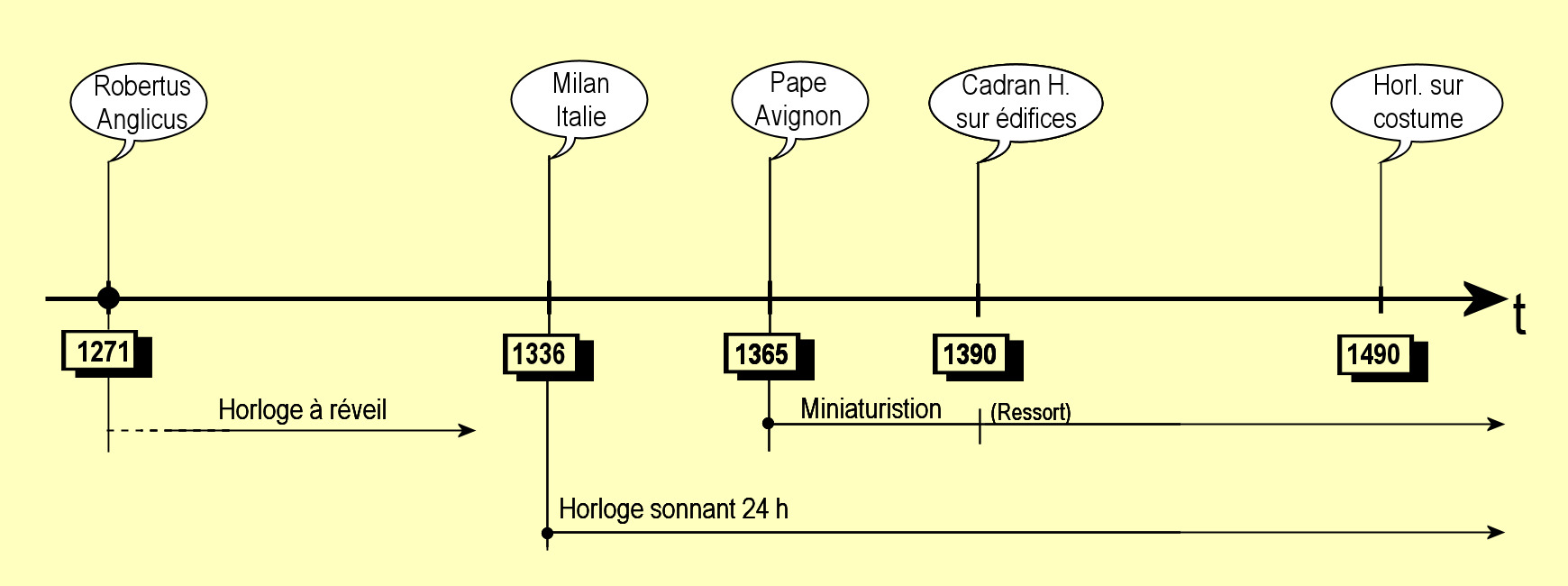 Apparition des premières horloges mécaniques médiévales par types.